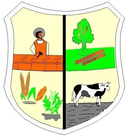 Escudo Yguazú